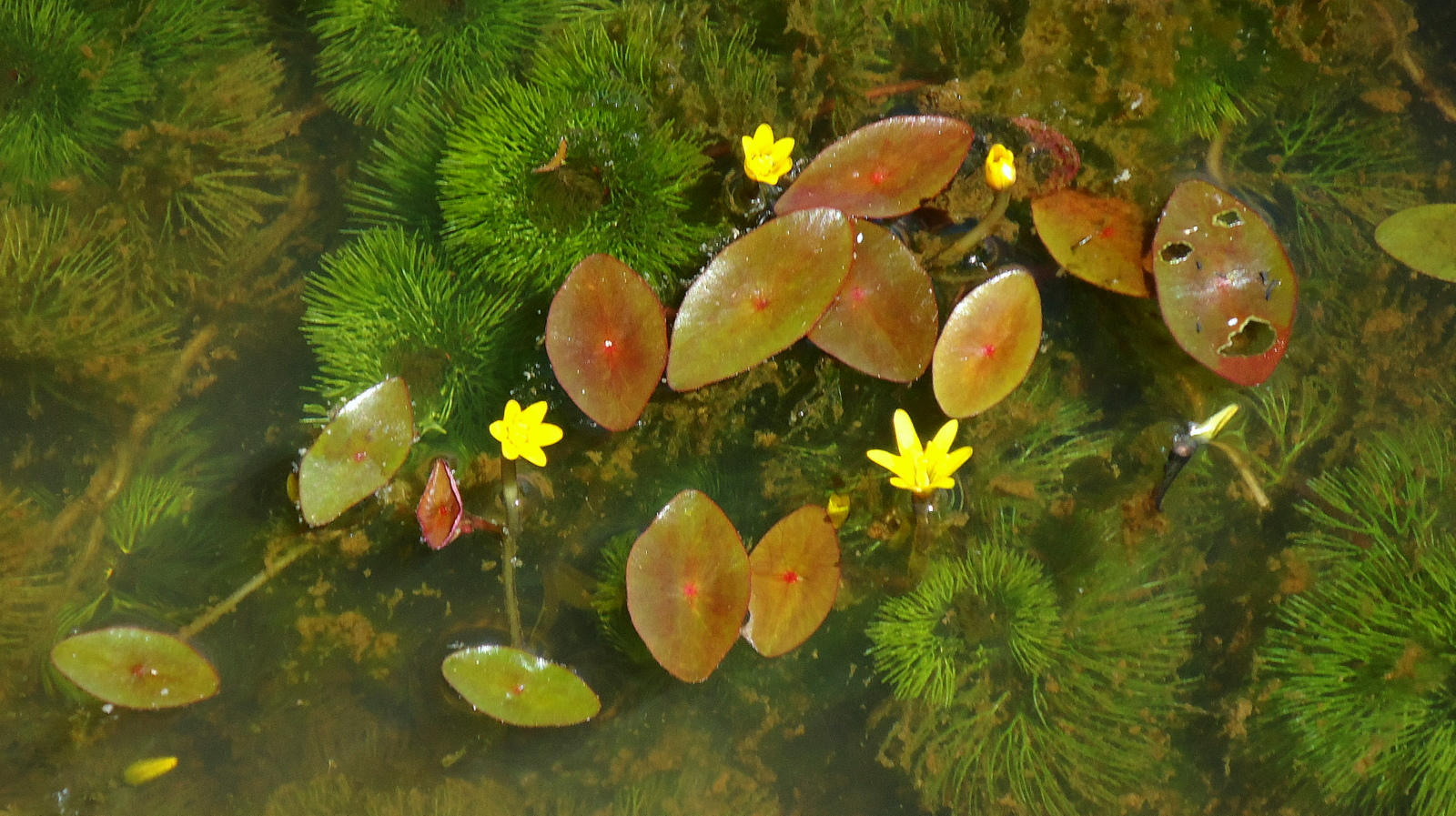 Cabomba aquatica Aubl.